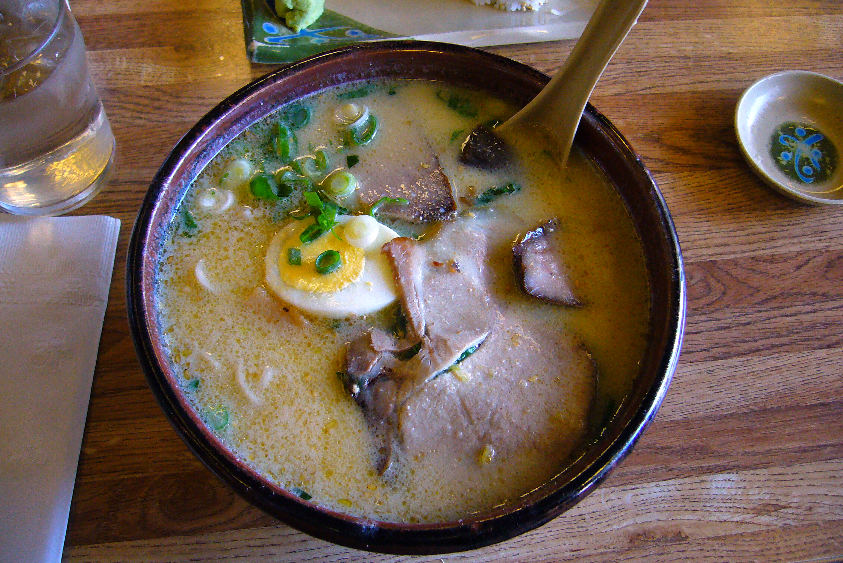 Miso Ramen